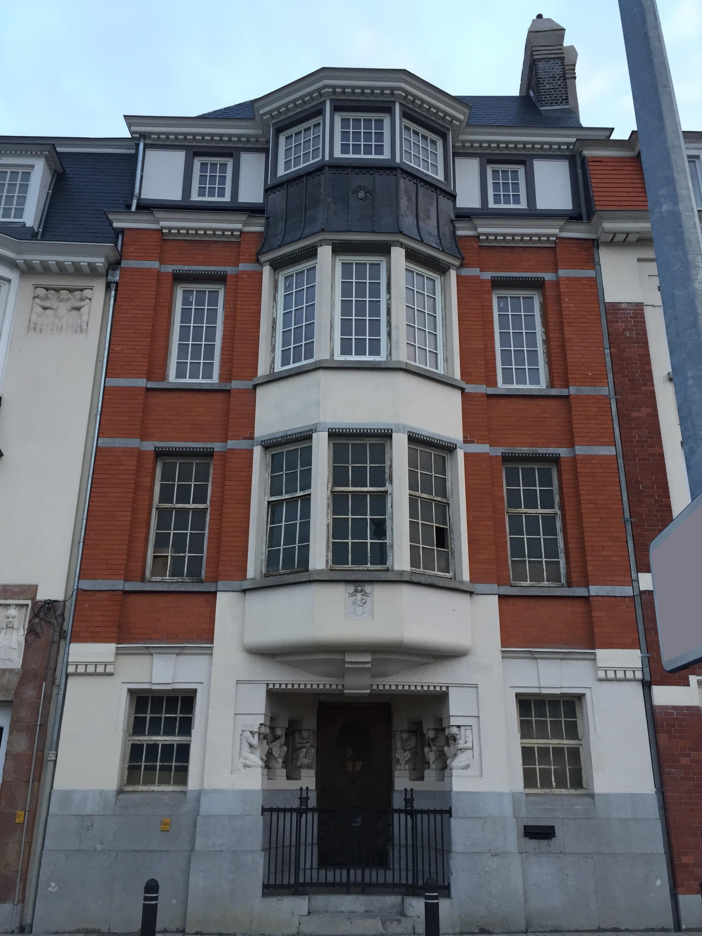 Het woonhuis "Eigen Heerd" van architect Valentin Vaerwyck uit 1914, het jaar na de Wereldtentoonstelling van 1913 in Gent. De woning werd opgericht vlakbij de plaats waar het Moderne Dorp gelegen was, waarvoor Vaerwyck de kerk, het gemeentehuis en het huis A. Mélotte ontworpen had.